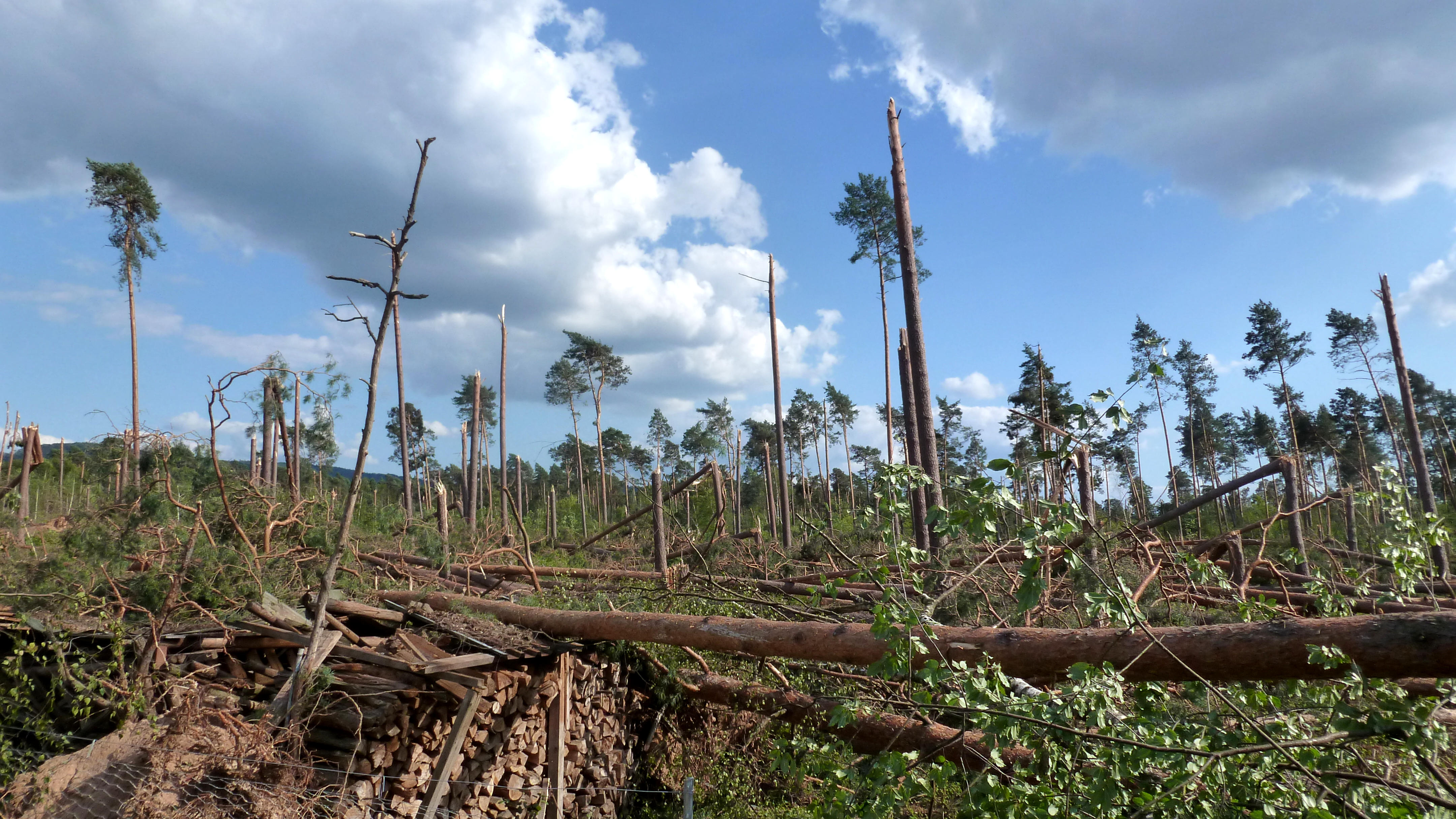 Sturmschaden vom 18. August in den Alzenauer Sanden